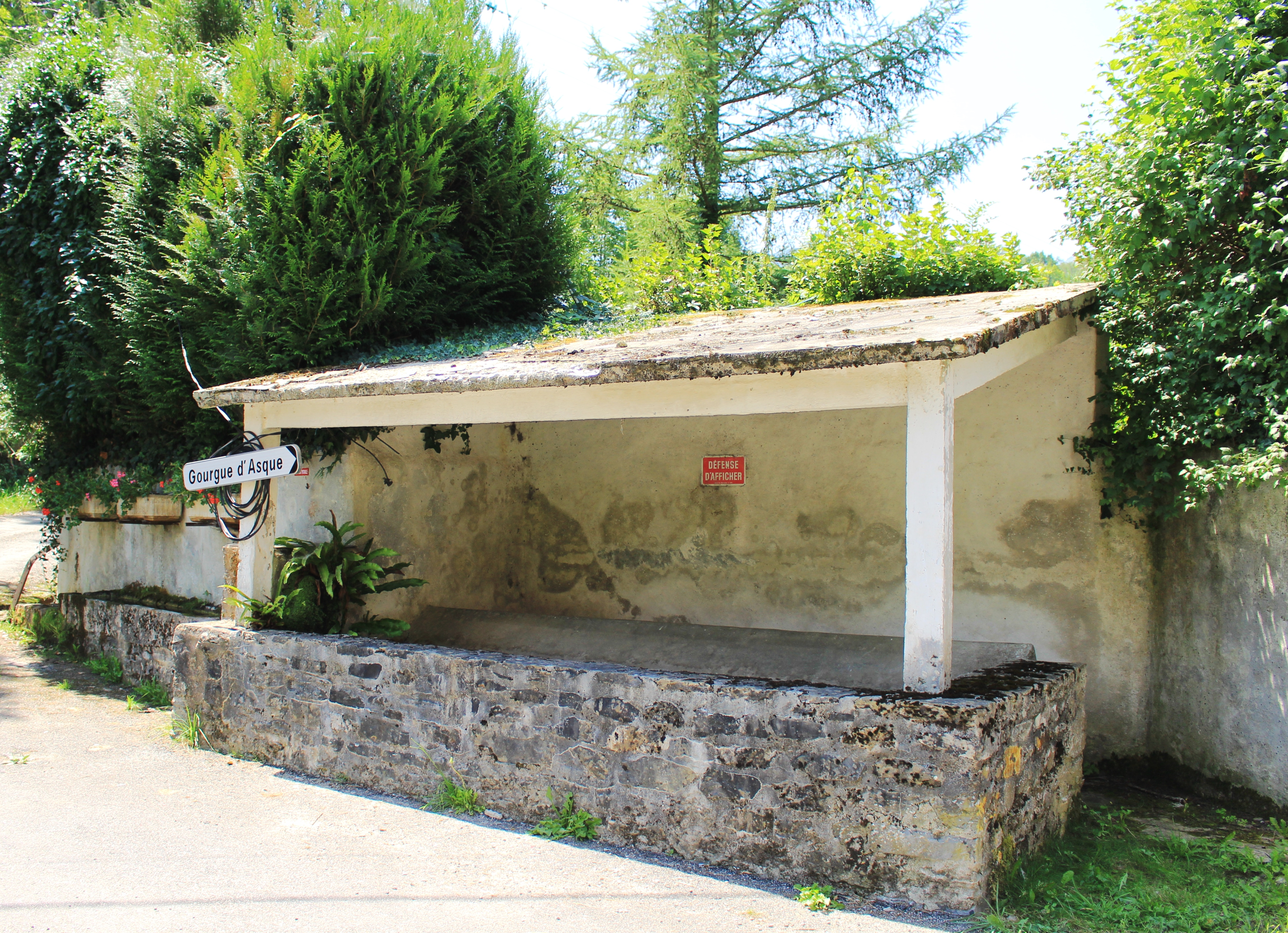 Lavoir de Bulan (Hautes-Pyrénées)